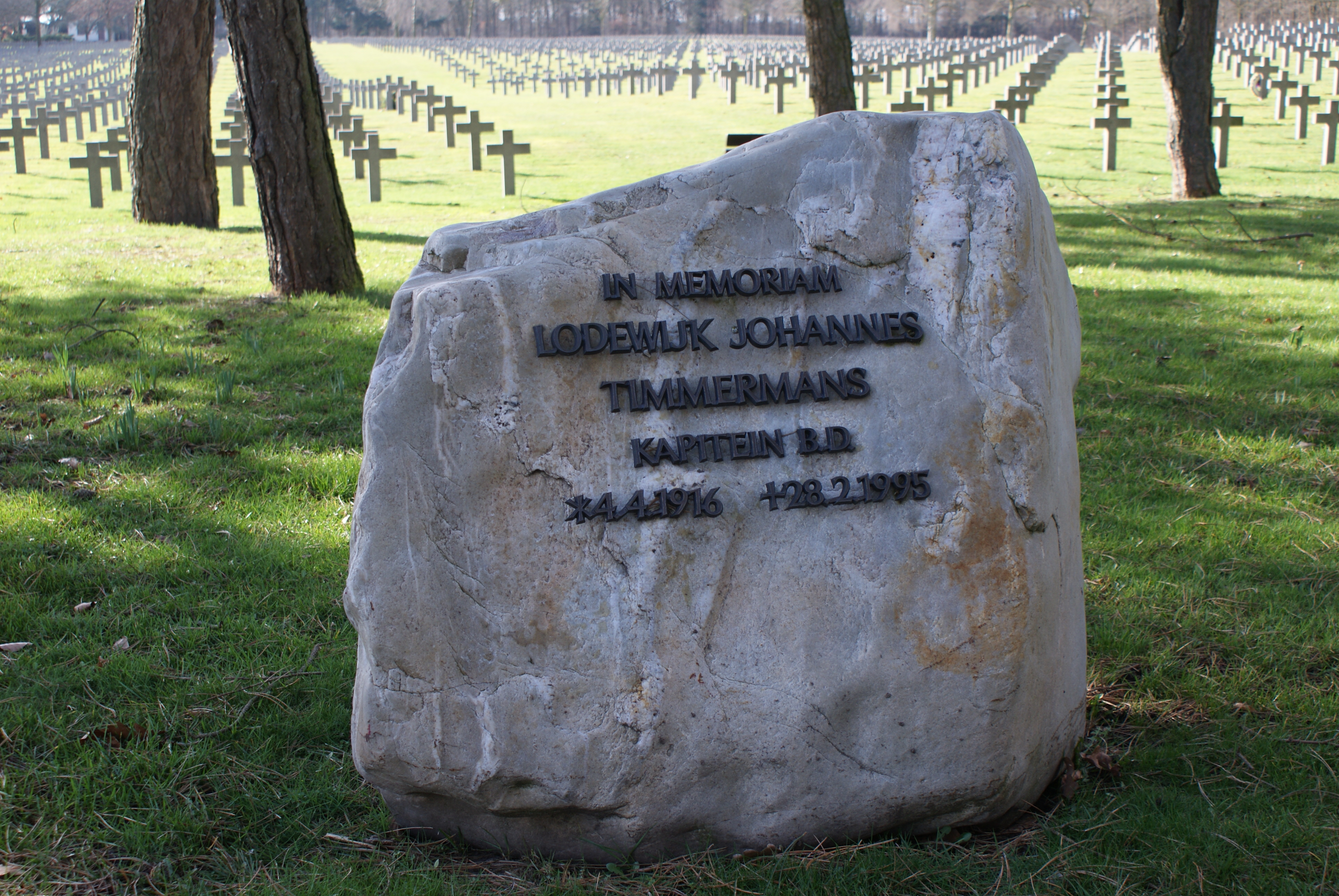 Gedenksteen Lodewijk Johannes Timmermans op de begraafplaats Yssesteyn.